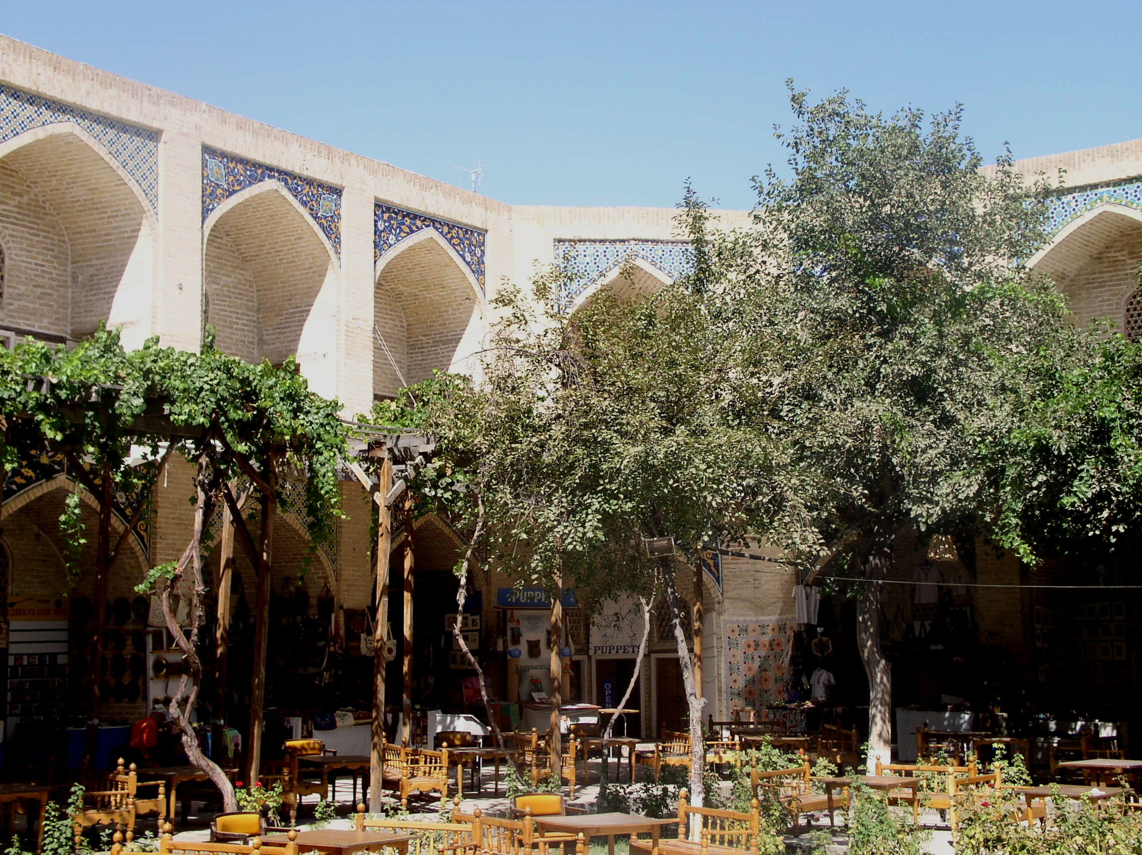 Nadir Divan-Beghi Madrasah courtyard, Bukhara, Uzbekistan